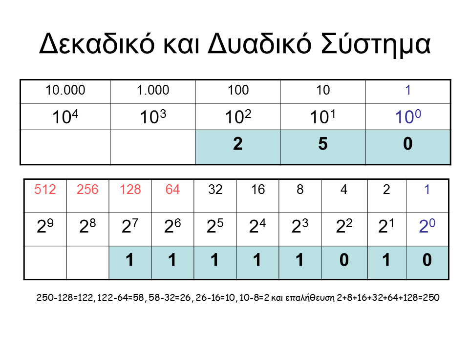 Παράδειγμα μετατροπής αριθμού από βάση-10 σε βάση-2: Ο δεκαδικός 250 σημειώνεται σε πίνακα με δυνάμεις του 10 και μέσω πίνακα με δυνάμεις του 2 γίνεται η μετατροπή του στον αντίστοιχο δυαδικό 11111010.